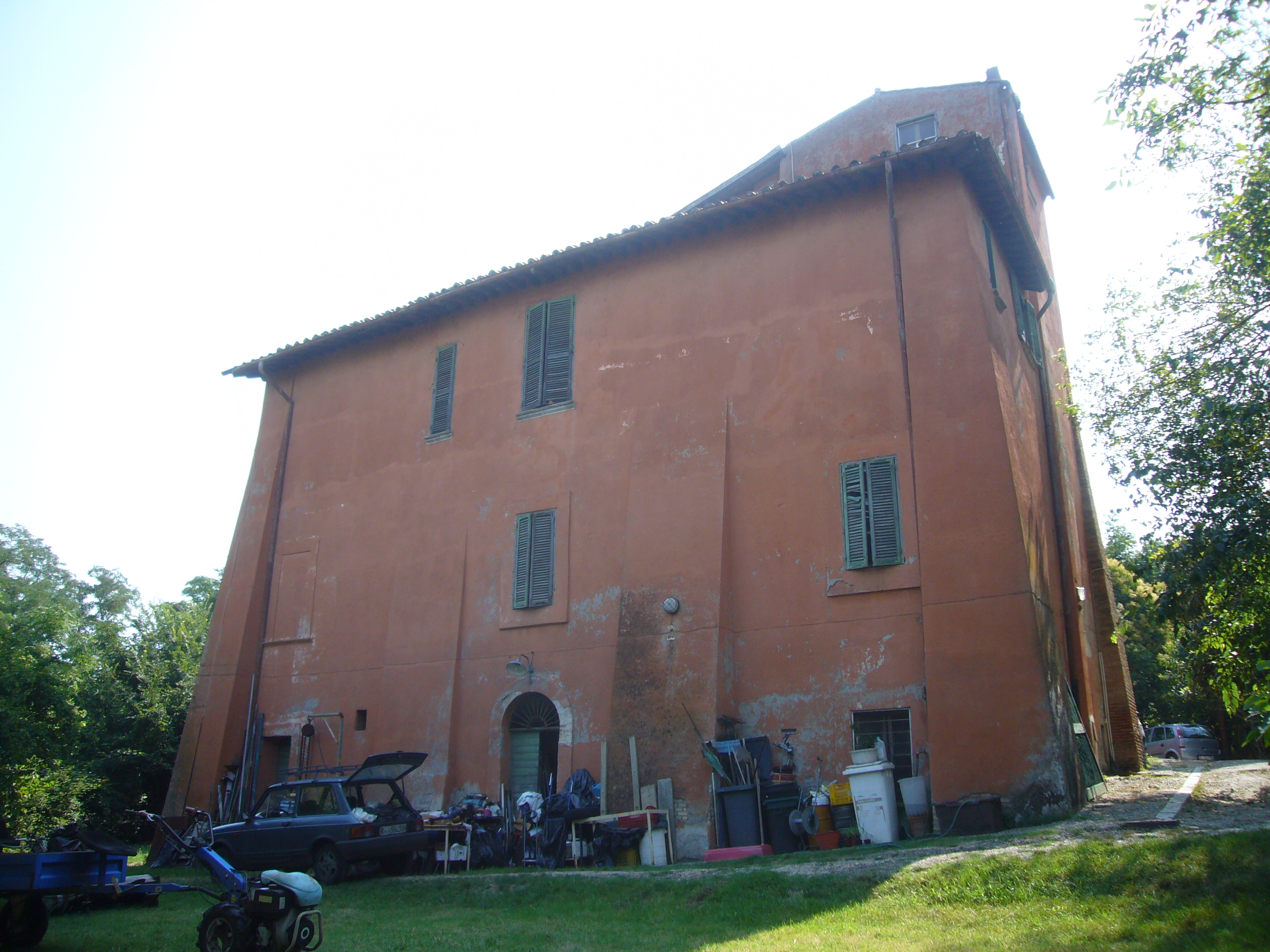 Roma, Villa Glori, il casale